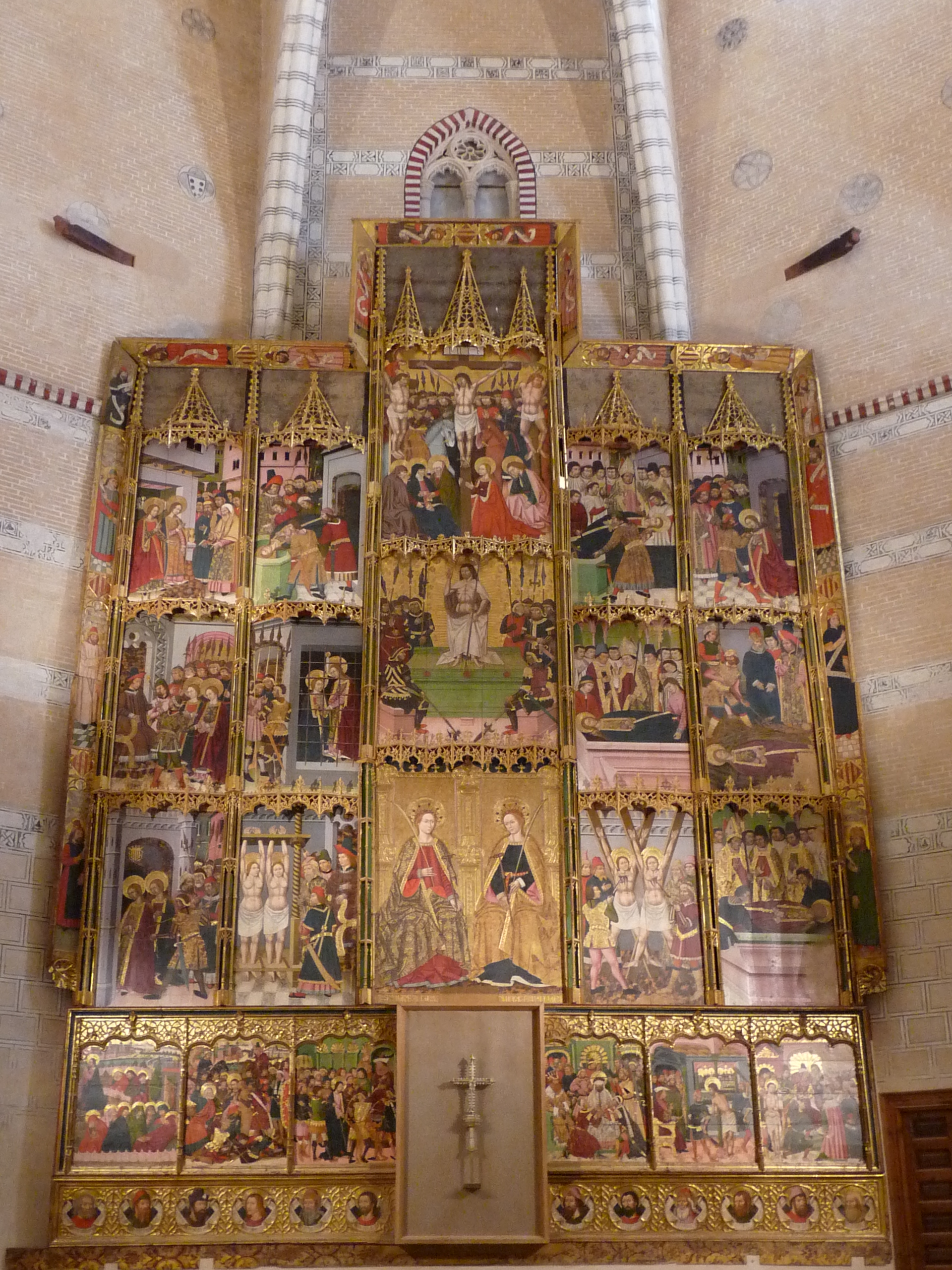 Maluenda - Iglesia de Santa Justa y Santa Rufina (1413) - Retablo mayor de Santas Justa y Rufina (encargado en 1475), realizado Juan Rius y Domingo Ram